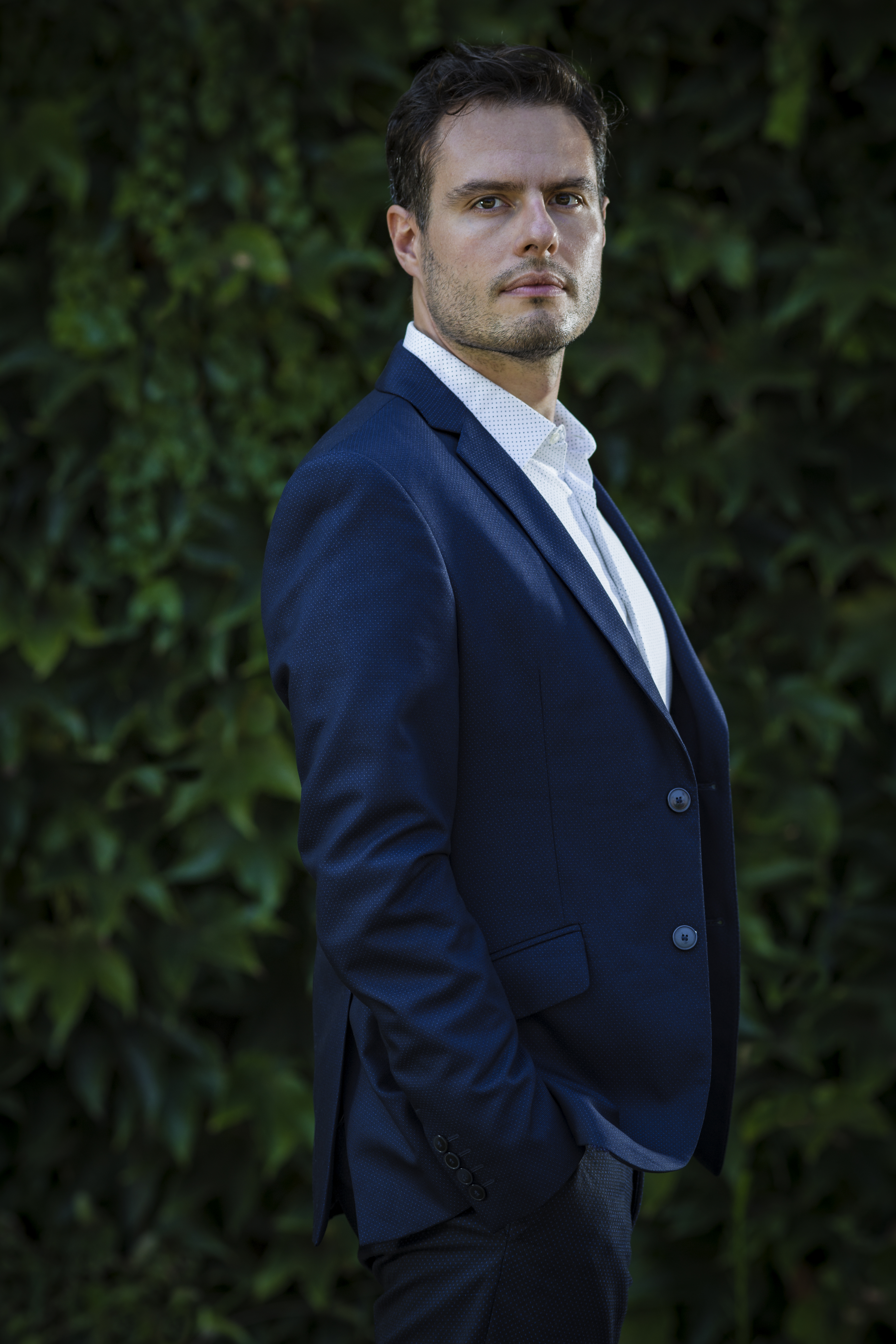 Raffaele Pe